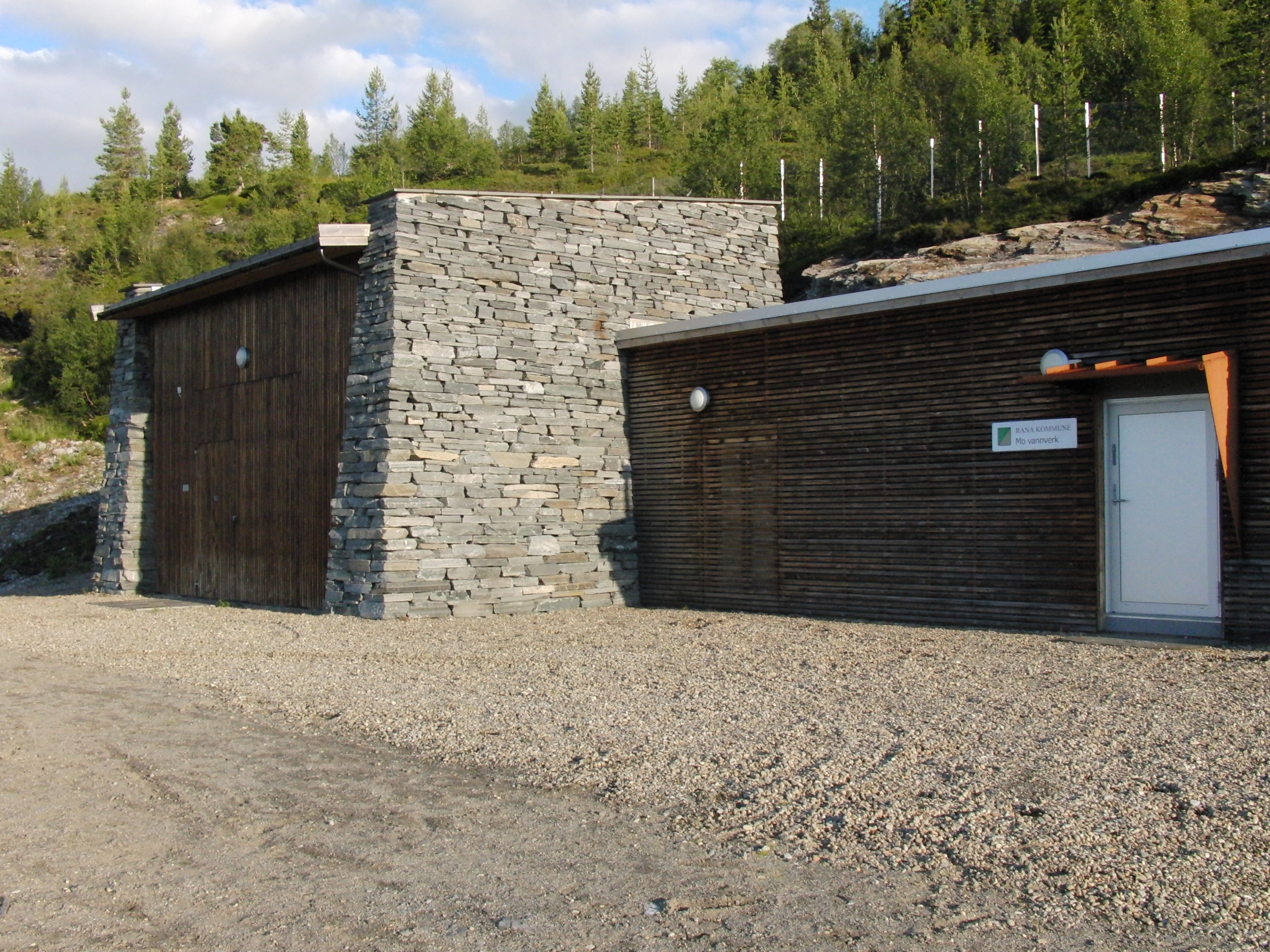 Mofjellet minikraftverk og vannverk